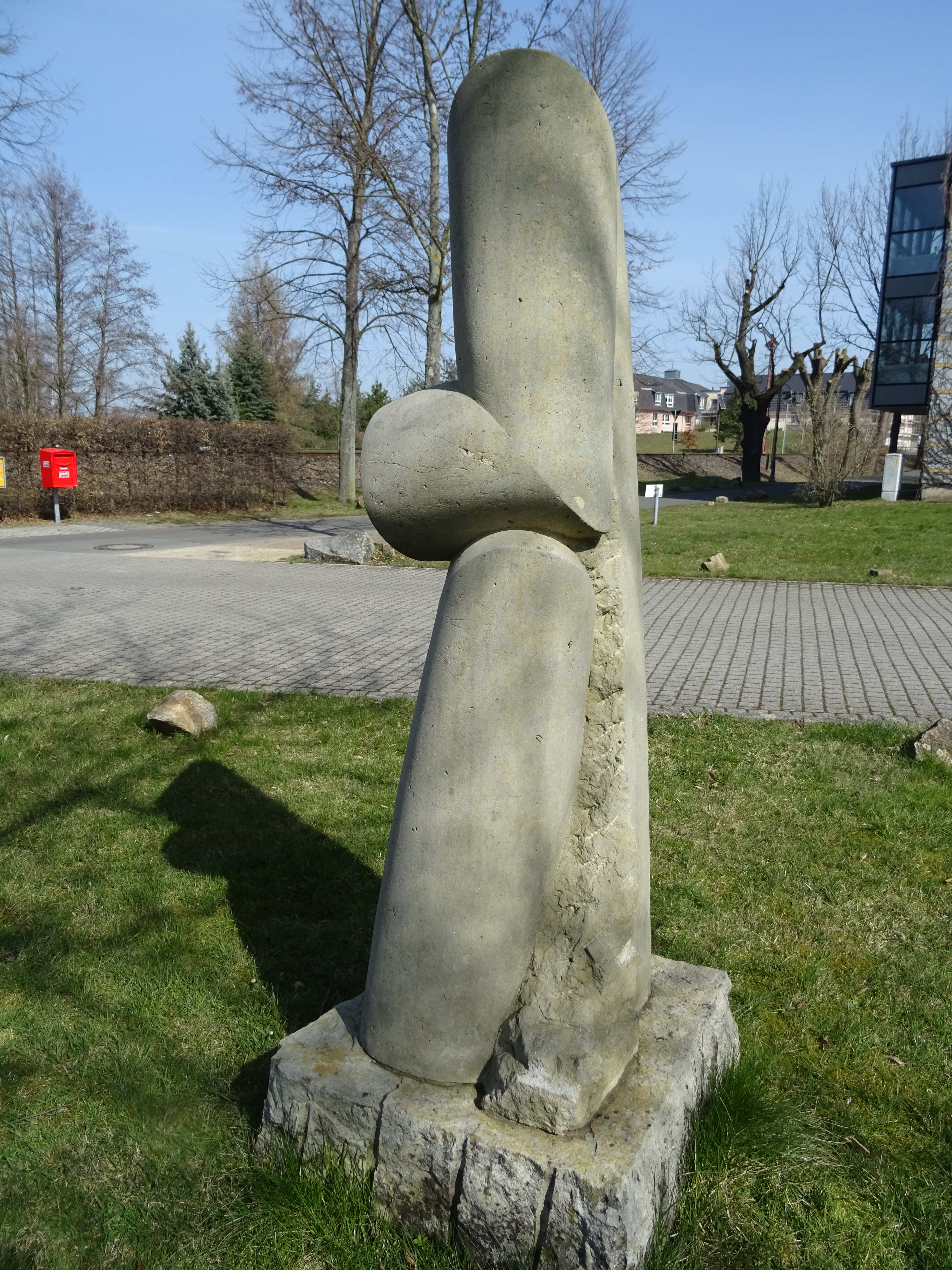 Moritzburg: Figur Kontrapost vom Bildhauer Lothar Beck zum 4.Internationalen Bildhauersymposium Moritzburg 2006. Standort: Evangelische Schule in Moritzburg.